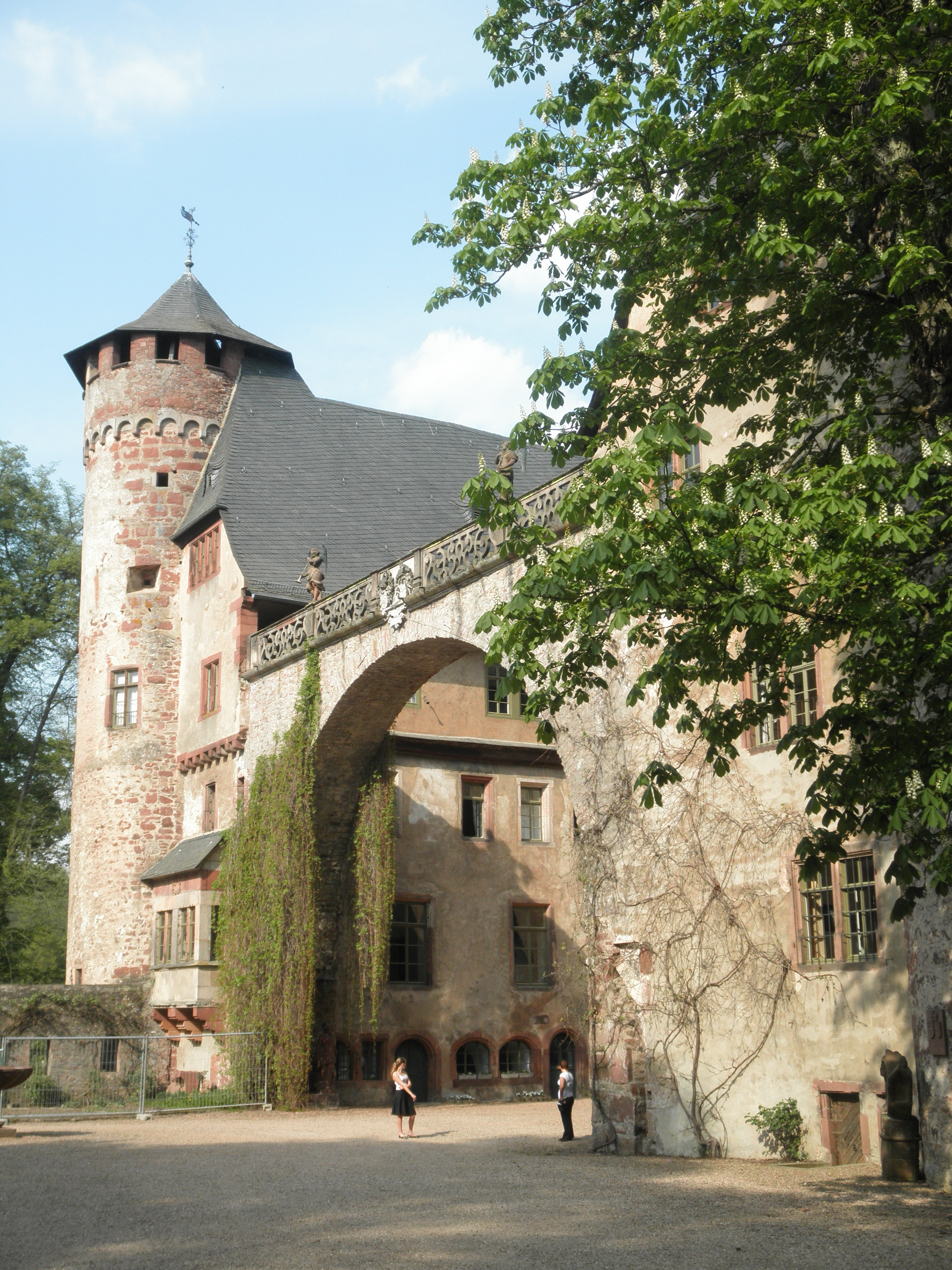 kastelo Fürstenau en Michelstadt